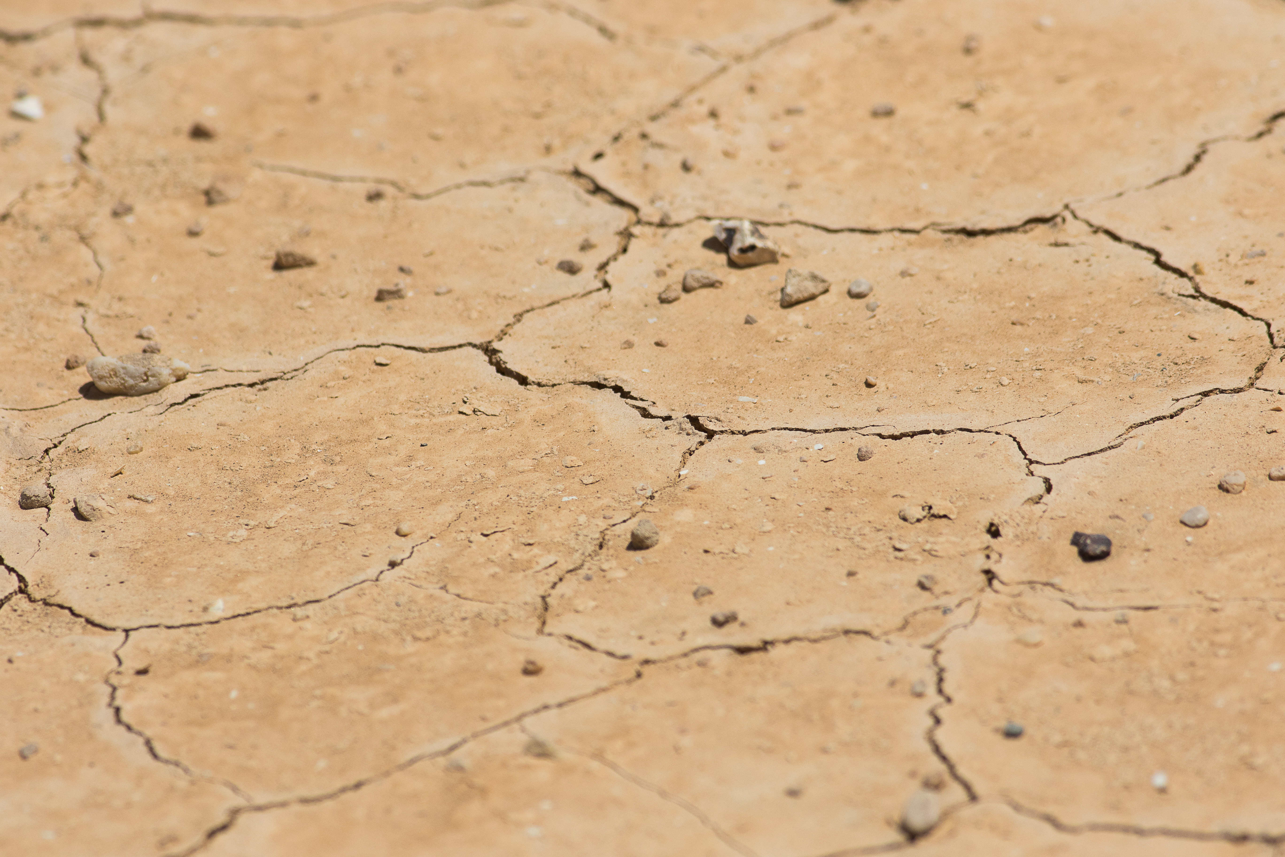 אדמת הנגב, צולם בסמוך לשדה בוקר